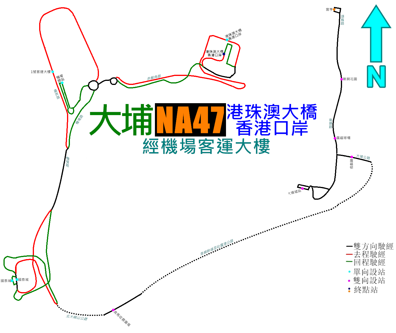 龍運巴士NA47線的走線圖